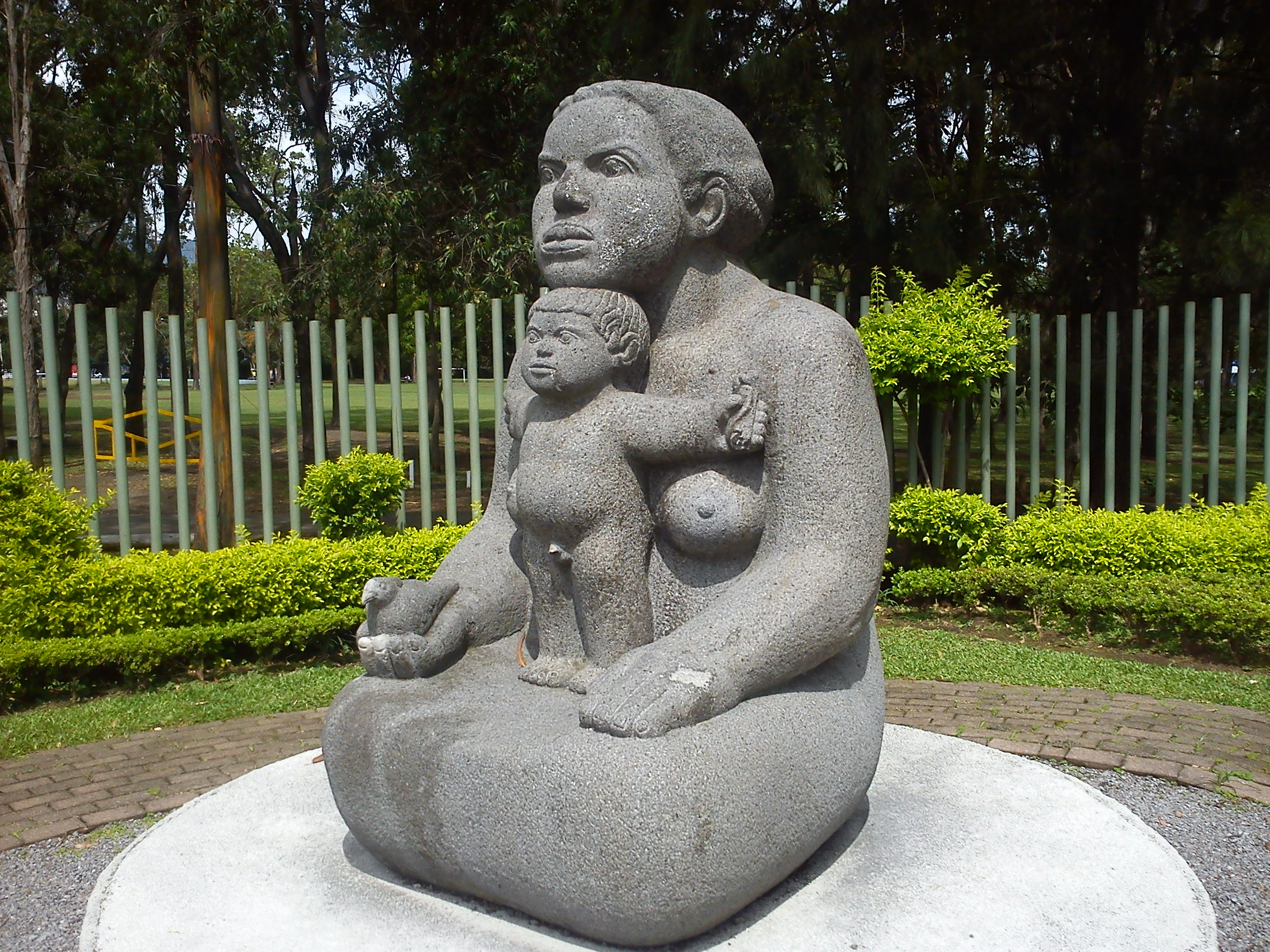 Escultura "Madre Tierra", obra de Crisanto Badilla Argüello (1979). Jardín de esculturas del Museo de Arte Costarricense.